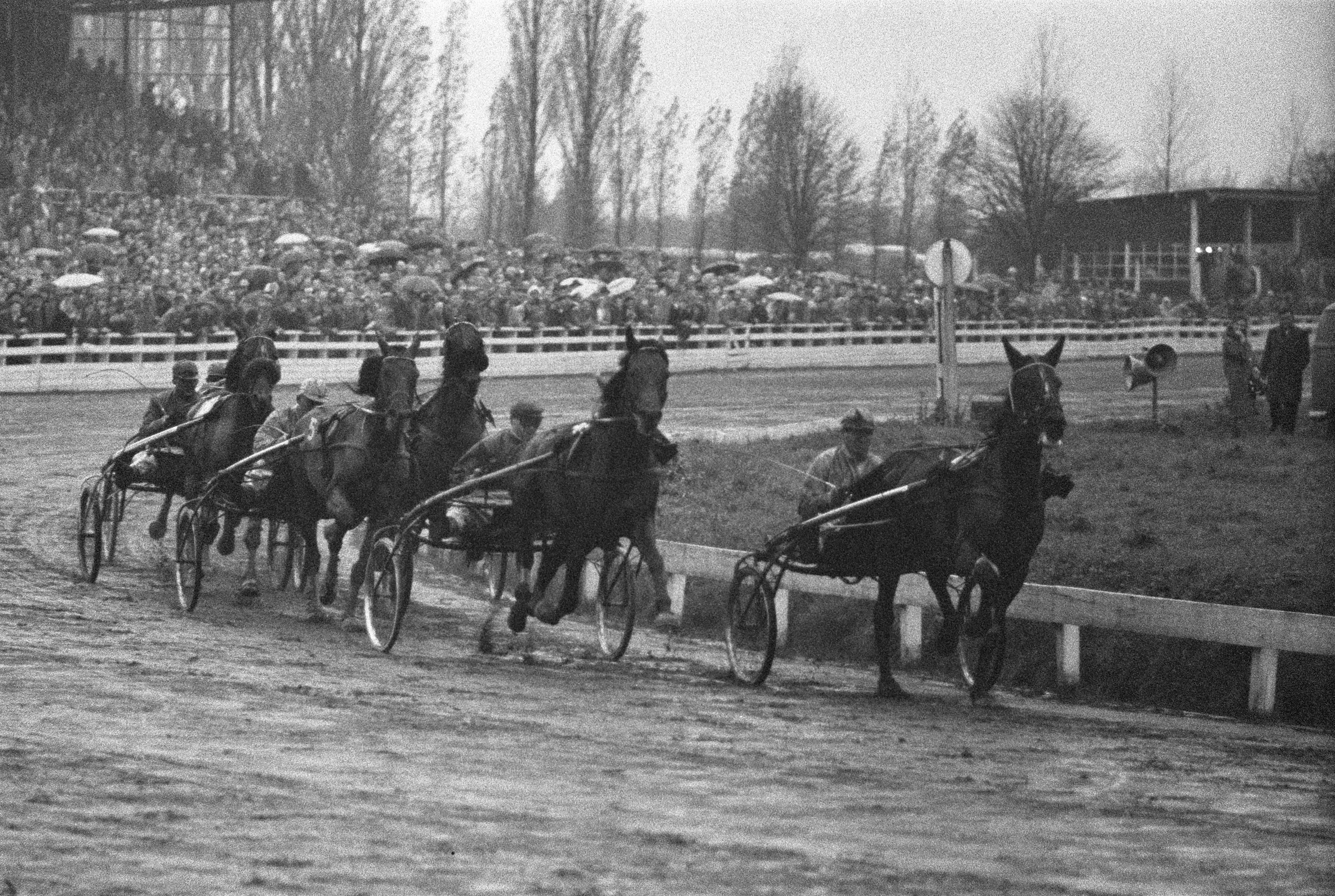 Collectie / Archief : Fotocollectie Anefo Reportage / Serie : [ onbekend ] Beschrijving : Draverijen op Mereveld, winnaar "vrijdag" op kop Datum : 30 oktober 1960 Trefwoorden : DRAVERIJEN, Winnaars Fotograaf : Pot, Harry / Anefo Auteursrechthebbende : Nationaal Archief Materiaalsoort : Negatief (zwart/wit) Nummer archiefinventaris : bekijk toegang 2.24.01.05 Bestanddeelnummer : 911-7273